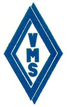 Firmenlogo von Viktor Müller Apparatebau Solingen